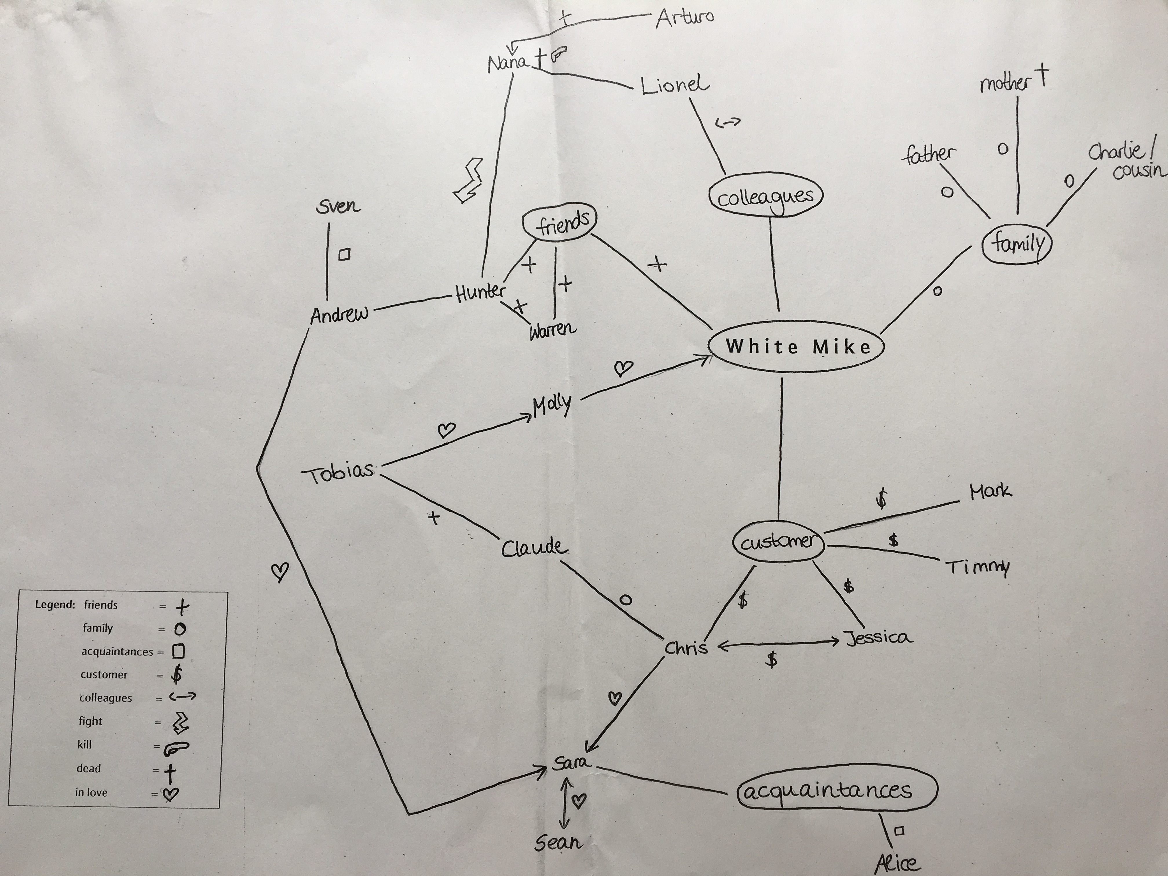 Die Beziehungen der Charaktere aus Twelve am Ende von Part IV